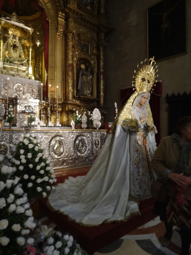 Iglesia de la Merced de Jerez de la Frontera